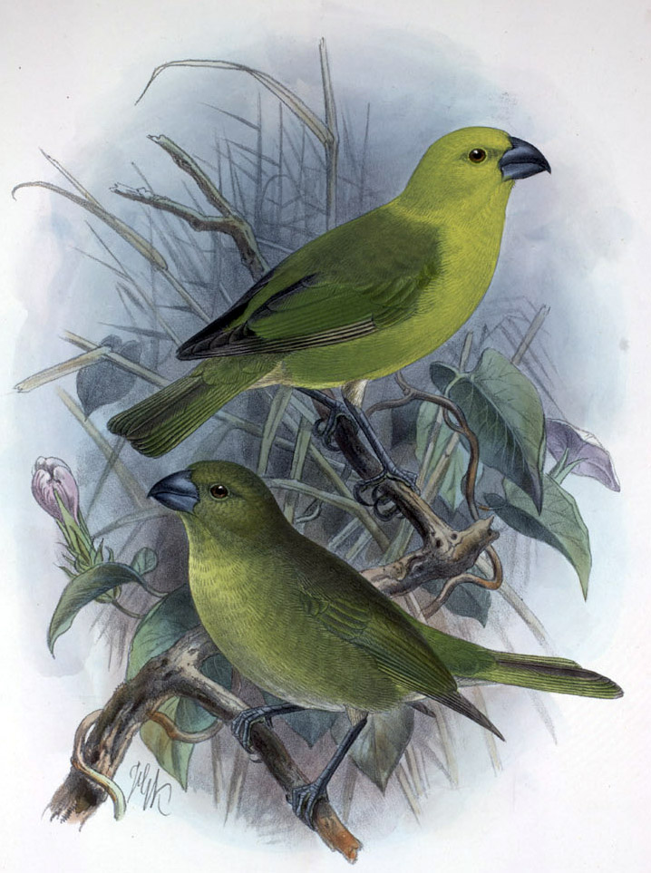 Rhodacanthis flaviceps (Original description: Telespiza flaviceps)